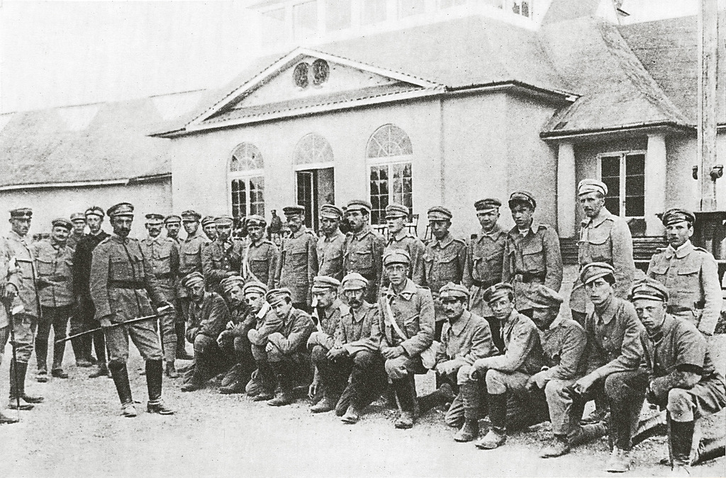 Pierwsza Kompania Kadrowa w Oleandrach.